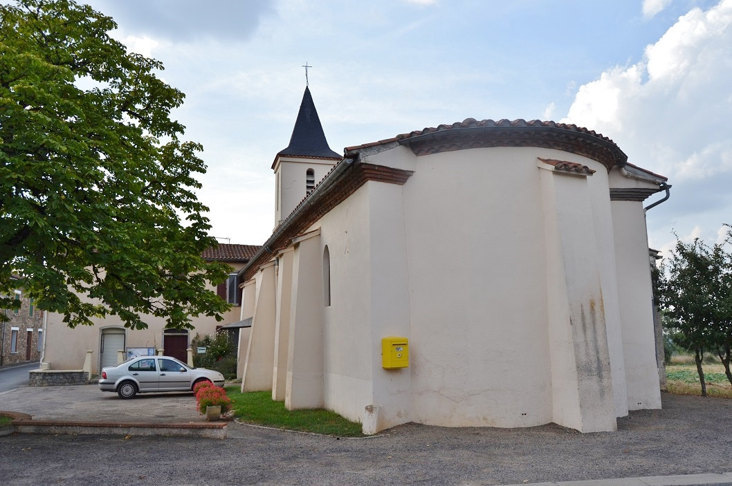 église Saint Etienne